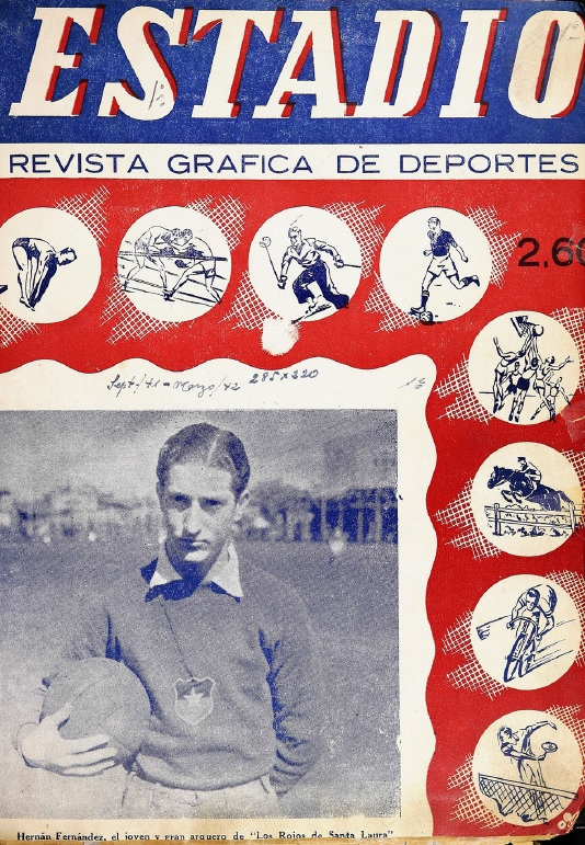 Revista Estadio, Año I, N.° 1, 12 de septiembre de 1941.